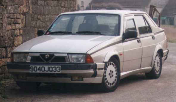 Image:PD-icon.svg